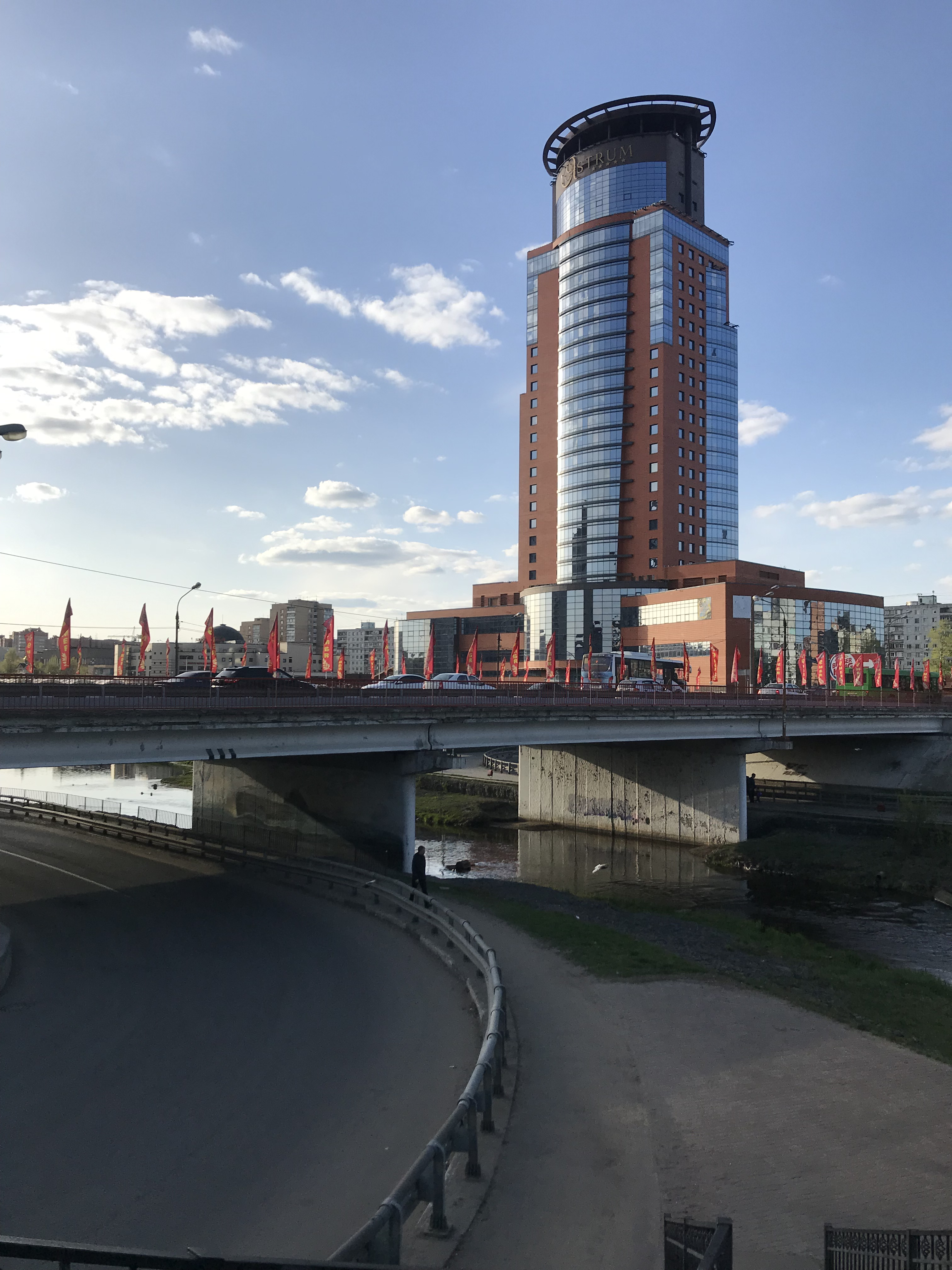 Мост через Клязьму